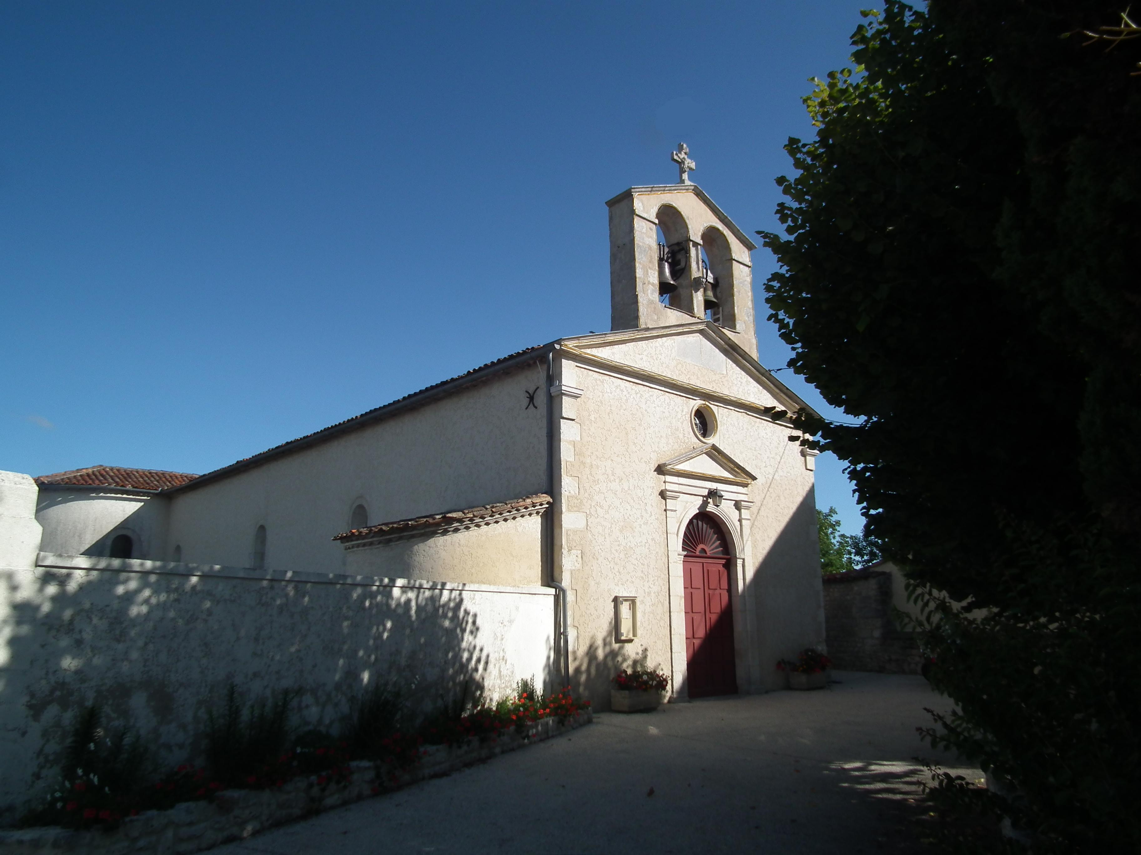 L'église du Chay, Charente-Maritime